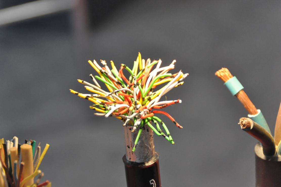 Hannover-Messe April 2012 Dieses Foto entstand durch die Mithilfe des gemeinnützigen Vereins Skillshare bei der Akkreditierung als Fotograf. Infos unter skillshare.eu Skillshare e.V. ist ein eingetragener gemeinnütziger Verein zur Förderung der Bildung durch Unterstützung der Erstellung, Sammlung und Verbreitung so genannten freien Wissens. IBAN: DE16 8306 5408 0004 8850 66 BIC: GENODEF1SLR Bank: VR-Bank Altenburger Land